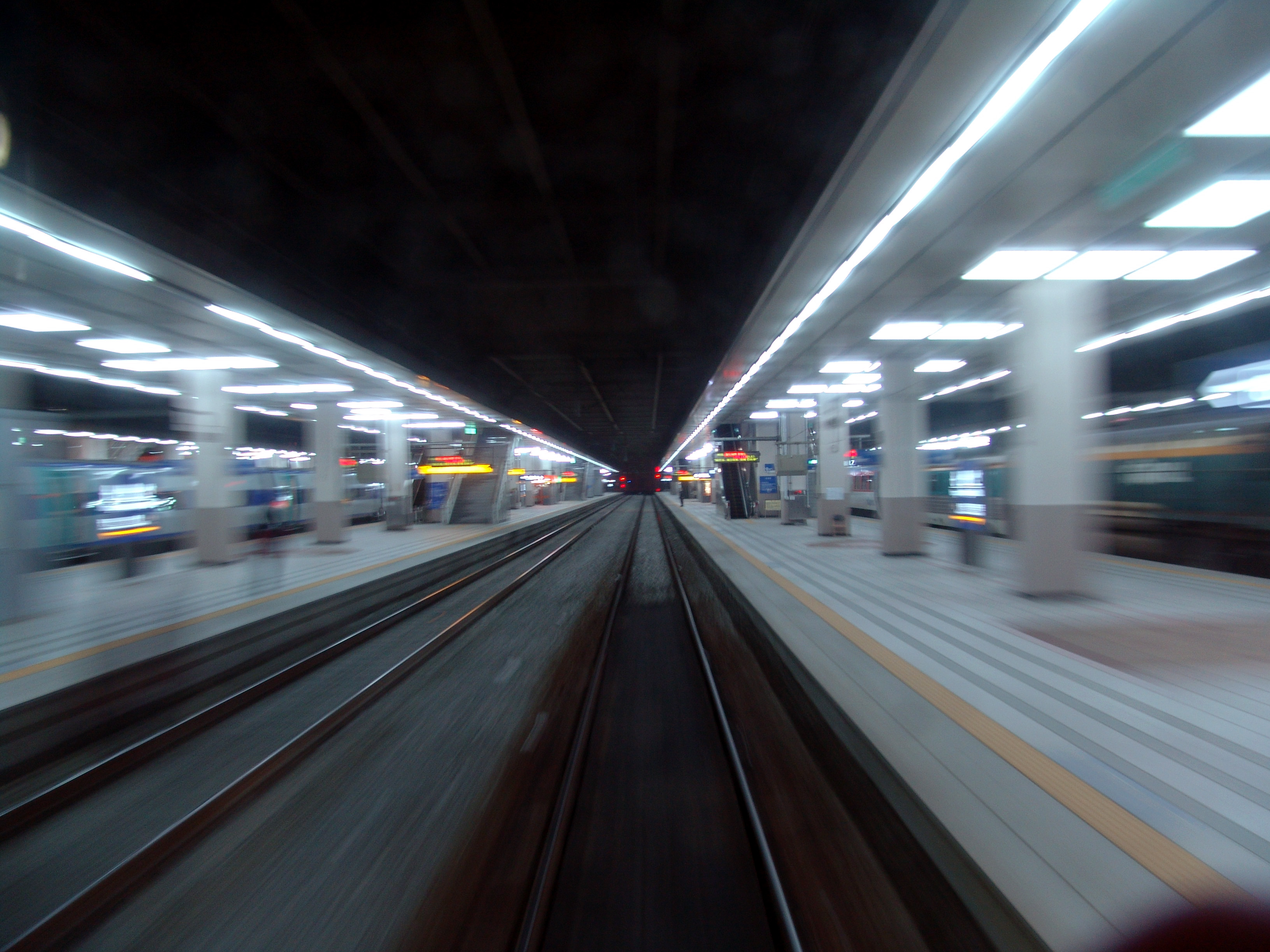 Abandonando la estación Yongsan hacia Suwon. Yo tomé la fotografía.